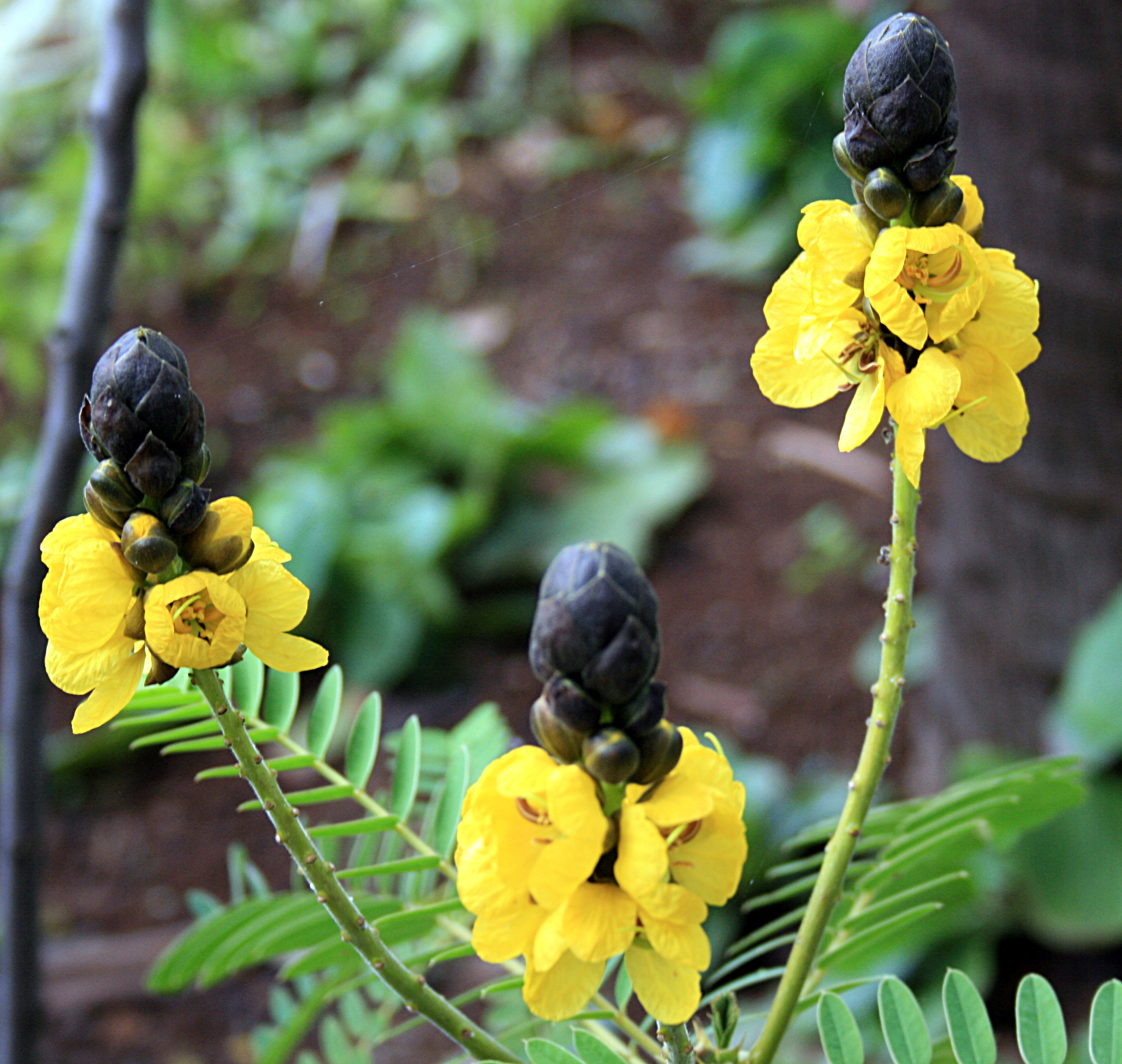 Senna didymobotrya at Funchal Botanischer Garten, Geflügelte Senna